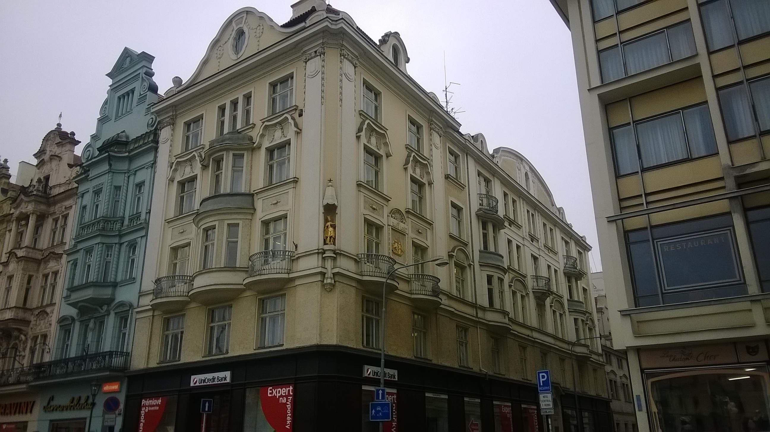 Dům U Zlaté lodě v Plzni